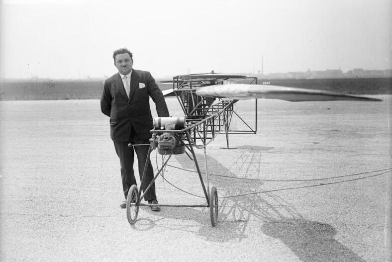 Ein interessantes Modell eines Kreisel-Flugzeuges des deutschen Ingenieurs Zaschka! Inseressant ist die Anbringung der rotierenden Tragflächen. Der Propeller befindet sich hinten. Mit den Versuchen soll demnächst begonnen werden. - Der deutschen Ingenieur Zaschka an seinem neuen Rotations-Flugzeug-Modell.